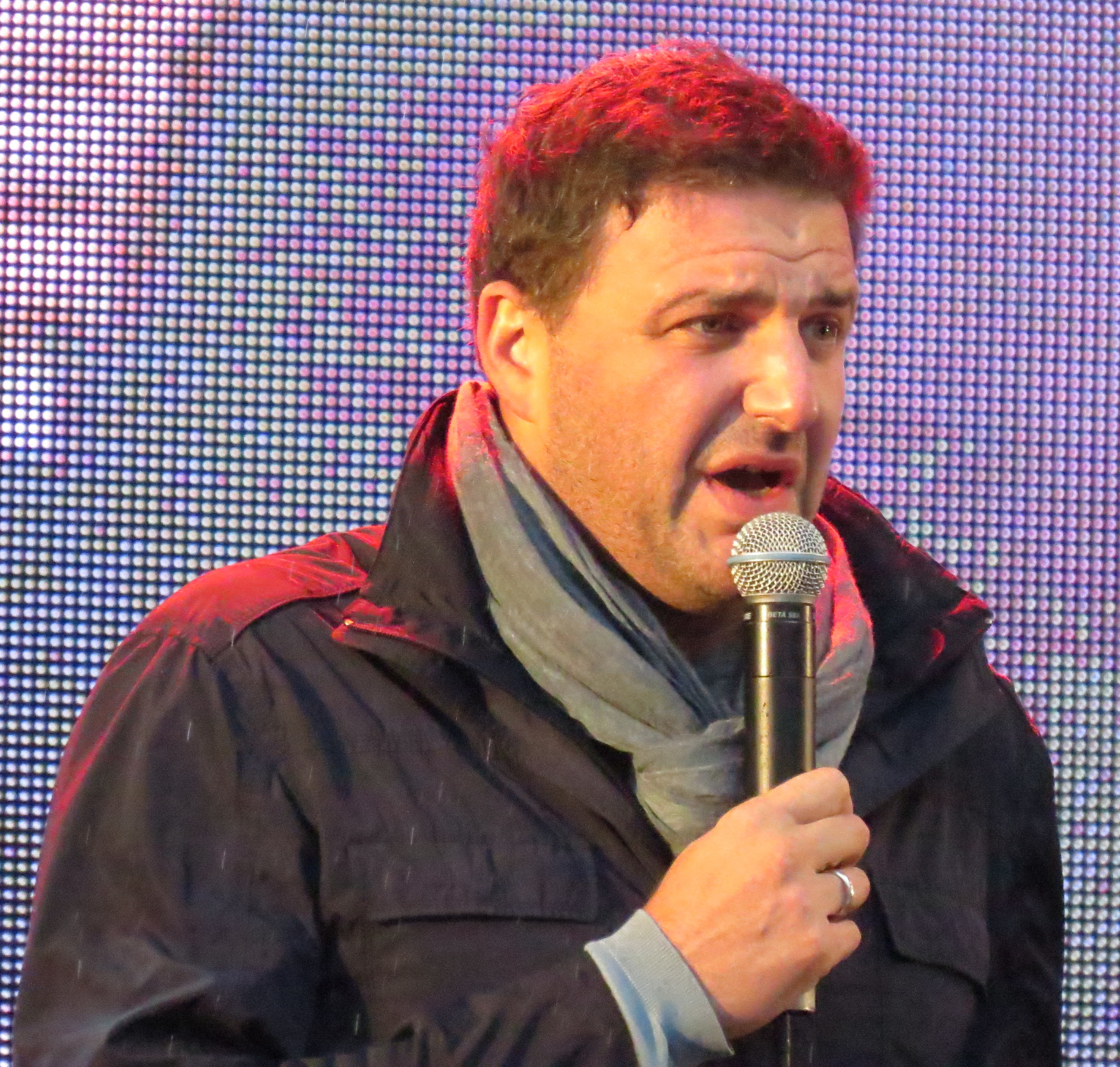 Максим Виторган на концерте-митинге в поддержку кандидата в мэры Москвы Алексея Навального на проспекте Сахарова 6 сентября 2013 года